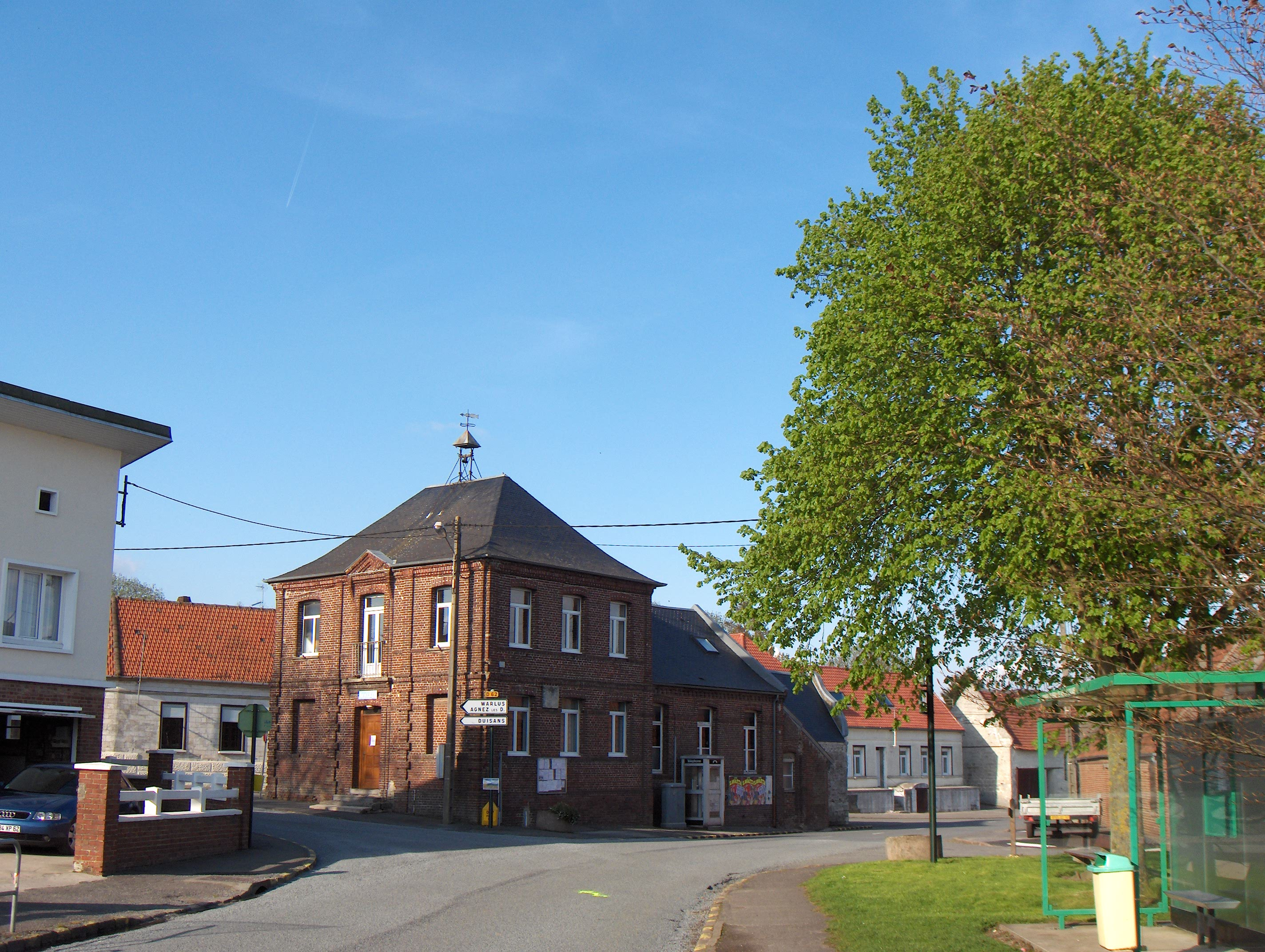 Berneville, mairie (dépt. Pas-de-Calais, France)